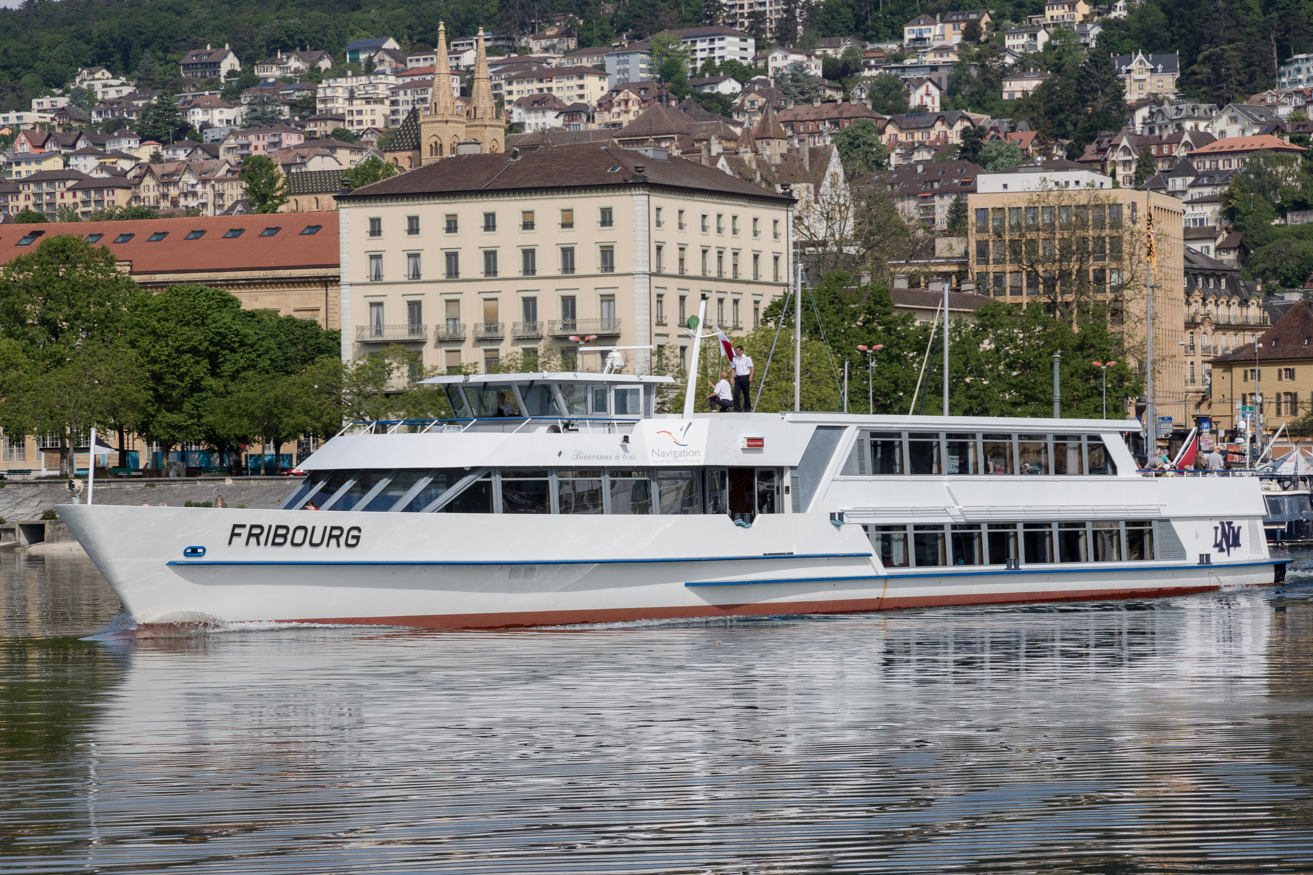 "MS Fribourg" verlässt den Hafen Neuchâtel